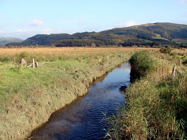 Afon Llyfnant near Eglwys Fach in Ceredigion, Wales.